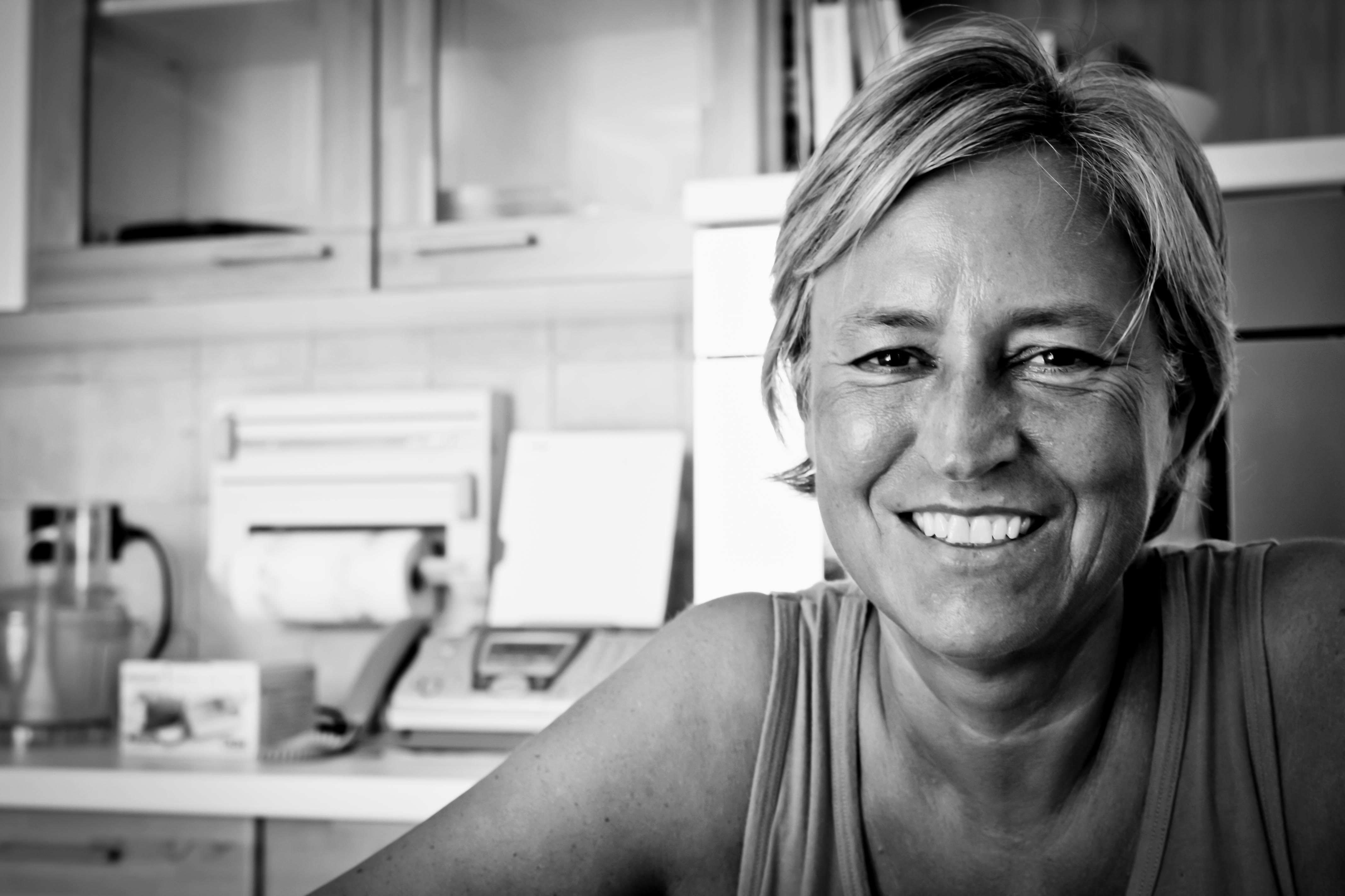 Foto dell'autrice realizzata da Daria Angeli